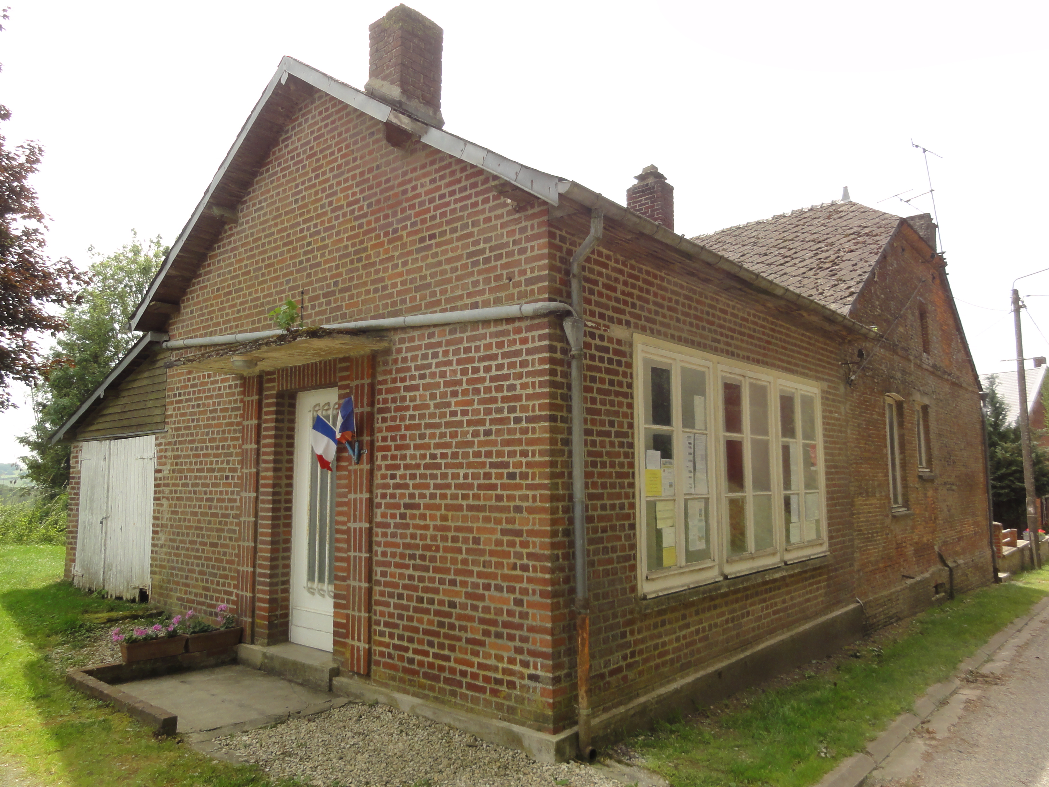 Rouvroy-sur-Serre (Aisne) mairie et ancienne école